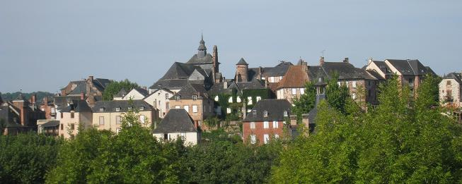 vue générale de la ville de meyssac